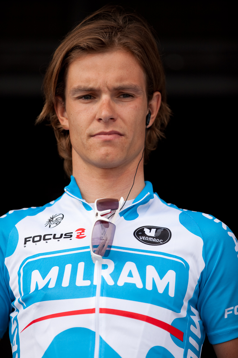 Linus Gerdemann, Eschborn-Frankfurt City Loop 2009